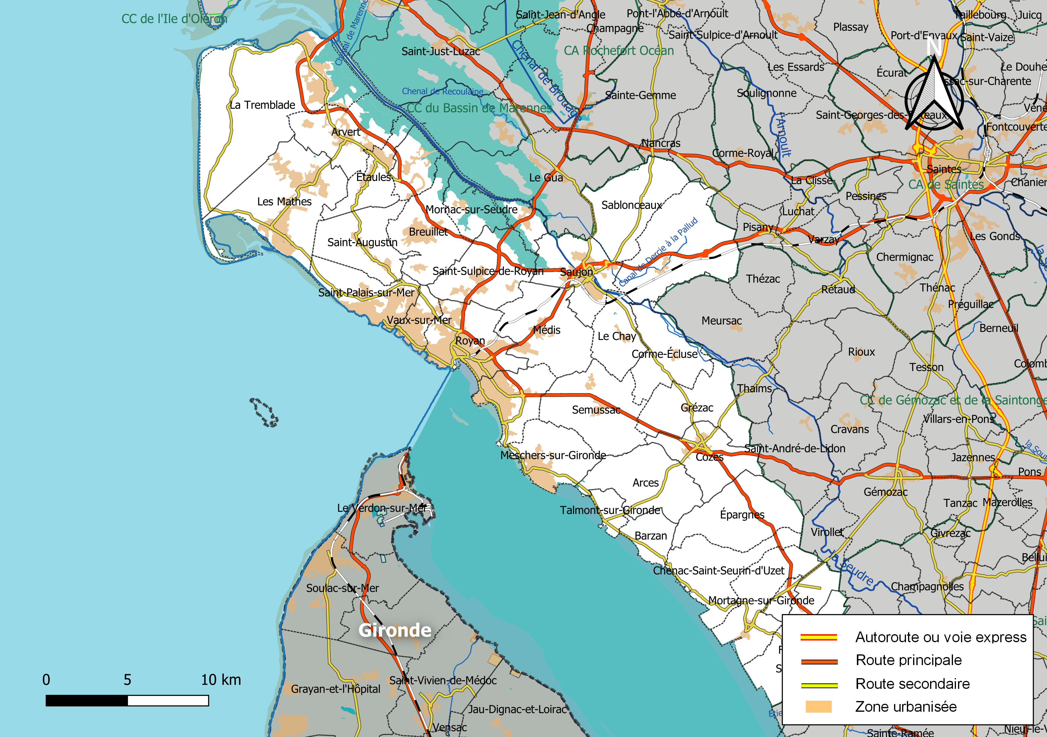 Carte géographique de la Communauté d'agglomération Royan Atlantique, département de la Charente-Maritime, France. Composition au 1er janvier 2019.